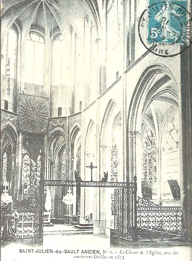 Il s'agit du chœur de la collégiale de Saint-Julien-du-Sault (Yonne) France séparée de la Nef par des grilles aujourd’hui enlevées.